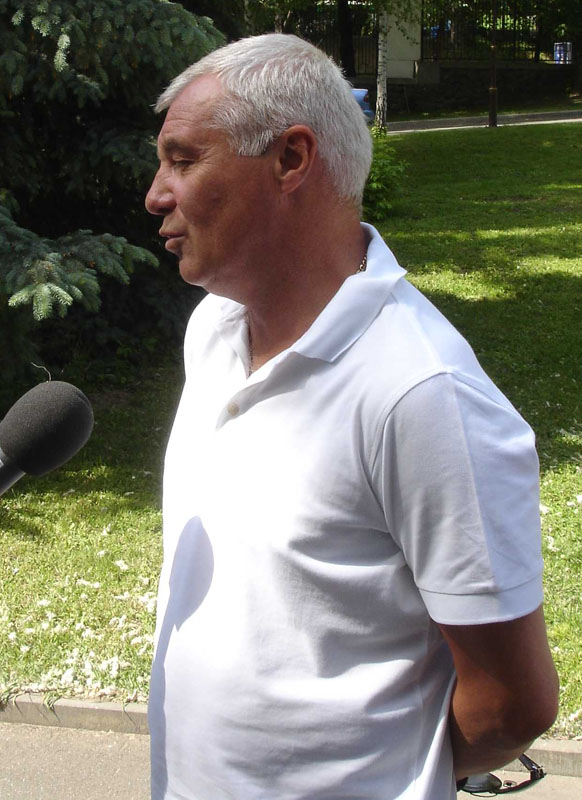 Демьяненко Анатолий Васильевич, 2012